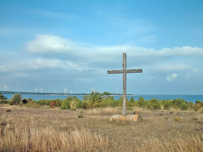 Gutasagaen: På S:t Olafsholm på Gotland står det i dag et enkelt kors til minne om Olav den hellige. I bakgrunnen vindmøller.